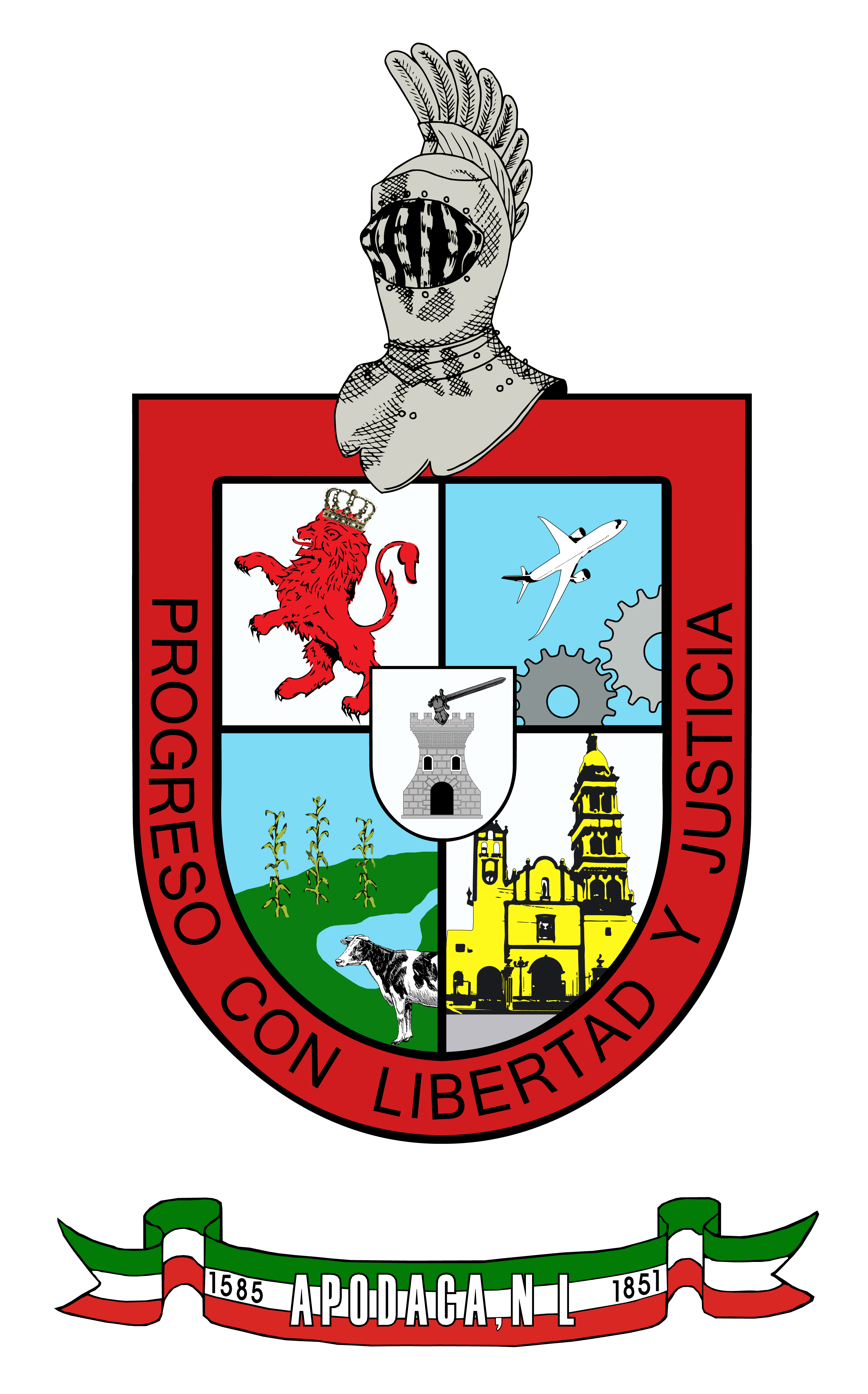 2958 x 4750 píxeles.